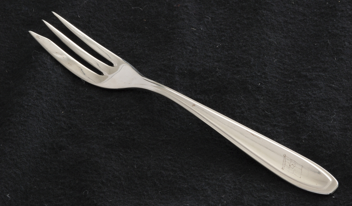 Kakegaffel i rustfritt stål. Foto: Wolday, Mekonnen / Kommandør Chr. Christensens Hvalfangstmuseum SSJ.02011.